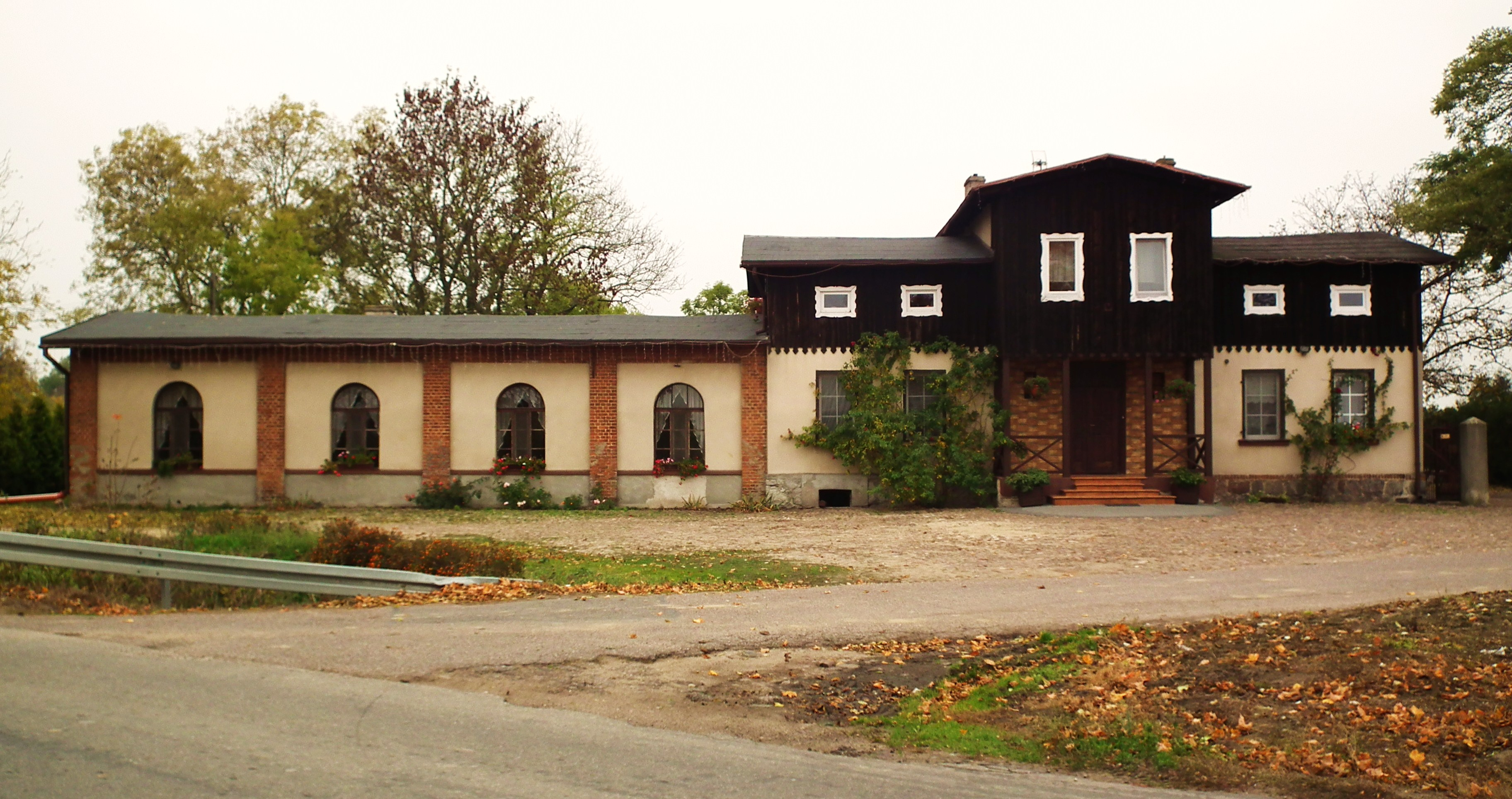 Dawna stacja kolei wąskotorowej w Gorzykowie (Gnieźnieńska KD).